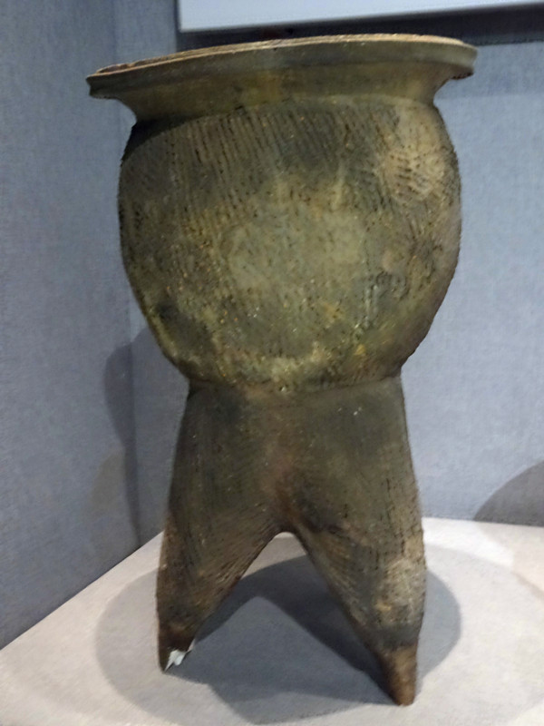 灰陶甗，河南博物院藏，商代前期文物，郑州市二里岗出土